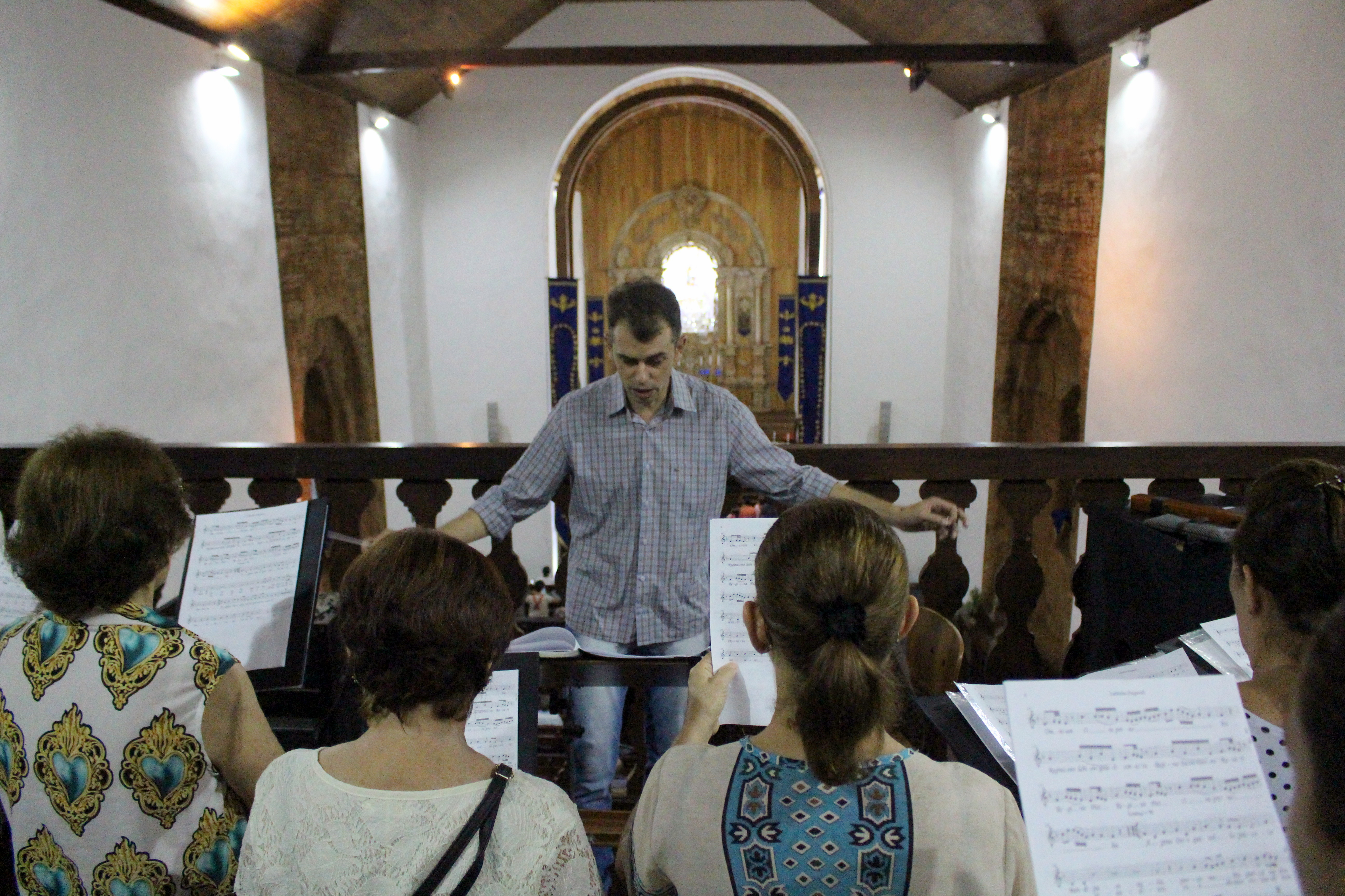 Atuação do Coro e Orquestra do Rosário em atividade religiosa.